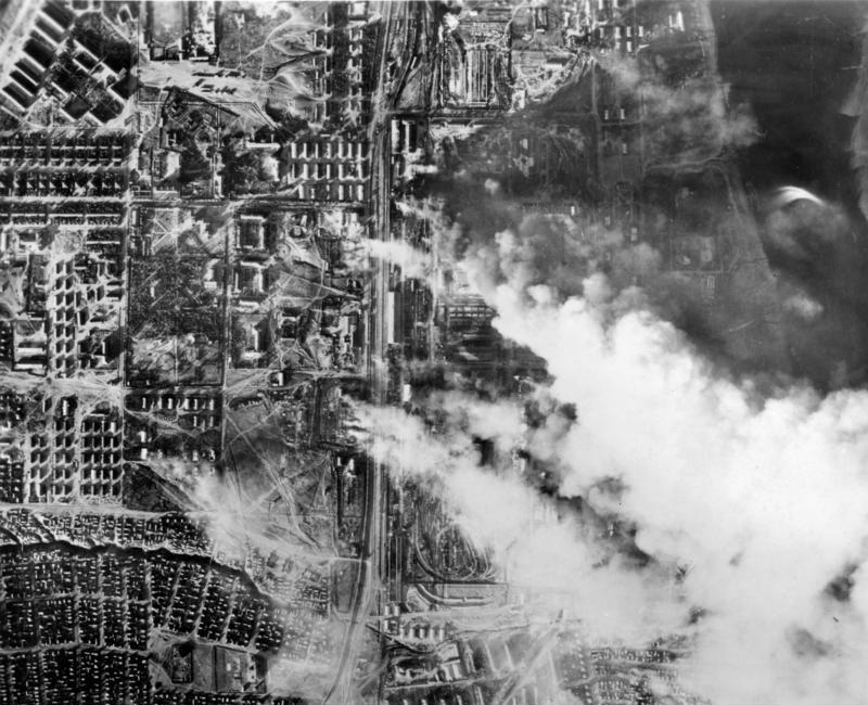 Russland, Kampf um Stalingrad, Luftangriff ADN-ZB II. Weltkrieg 1939-45 Luftaufnahme von Wolgograd während der schweren Kämpfe um die Stadt im September 1942 [Sowjetunion.- Schlacht um Stalingrad]